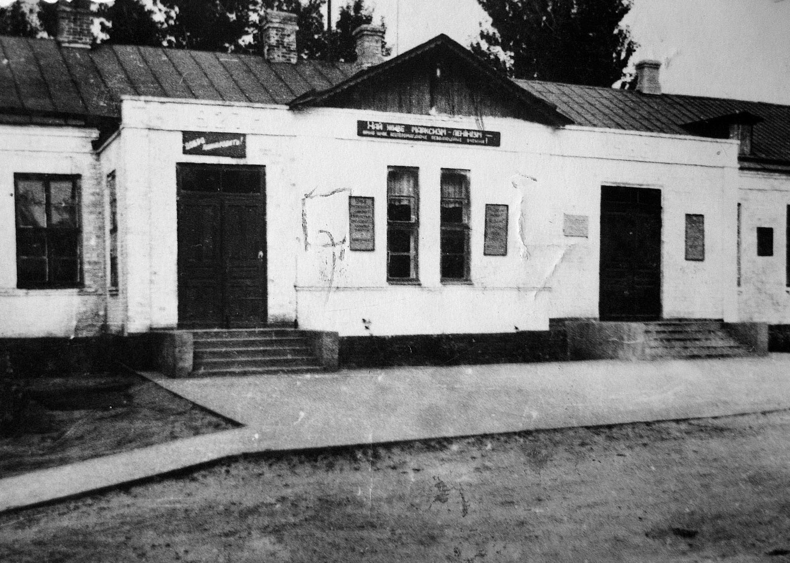 Высокополье. Старая школа.